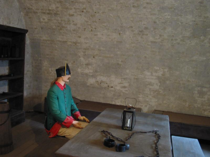 Špilberk je barokní pevností a připomínkou městských opevnění nesoucí kdysi označení žalář národů